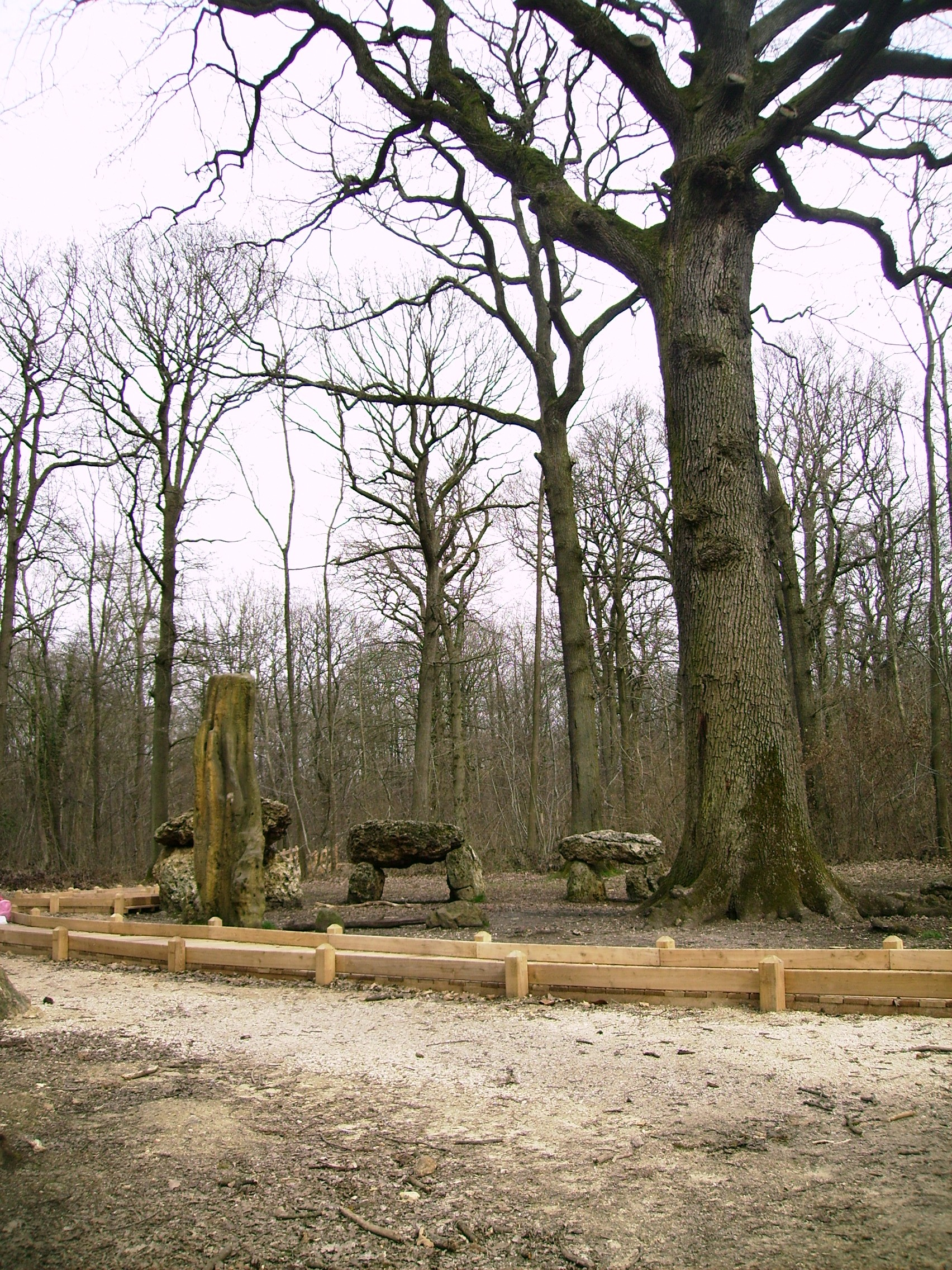 Menhir et faux dolmens en forêt de Meudon.